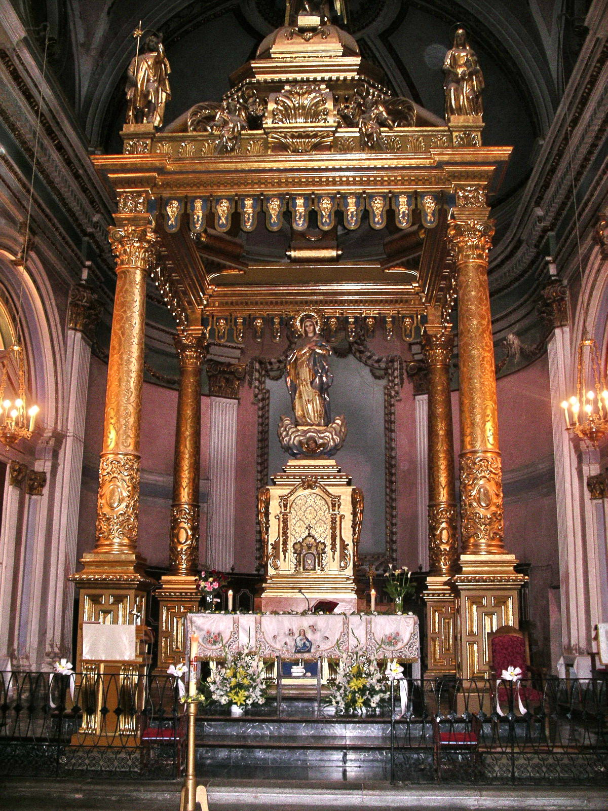 Iglesia de Linares de Mora (Teruel)